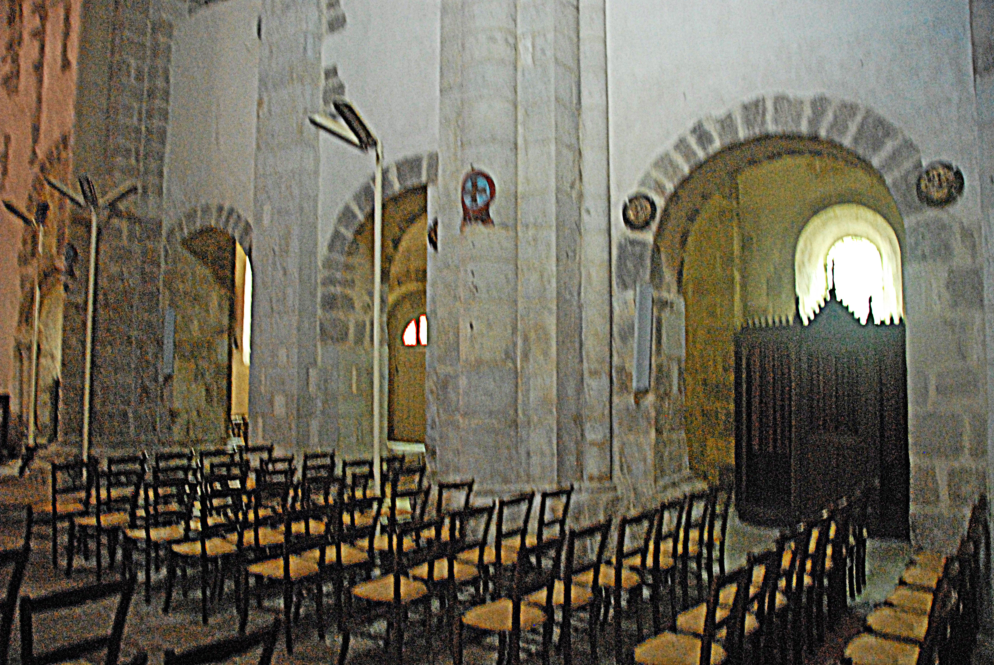 Neuvy_St.-Sépulcre, Basilika, Mittelschiff, SW-Wand, unten